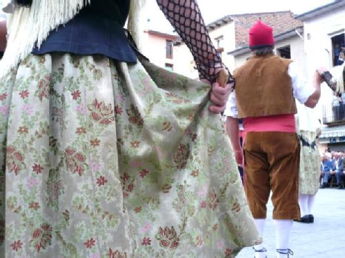 foto de falda de bailadora y un bailador